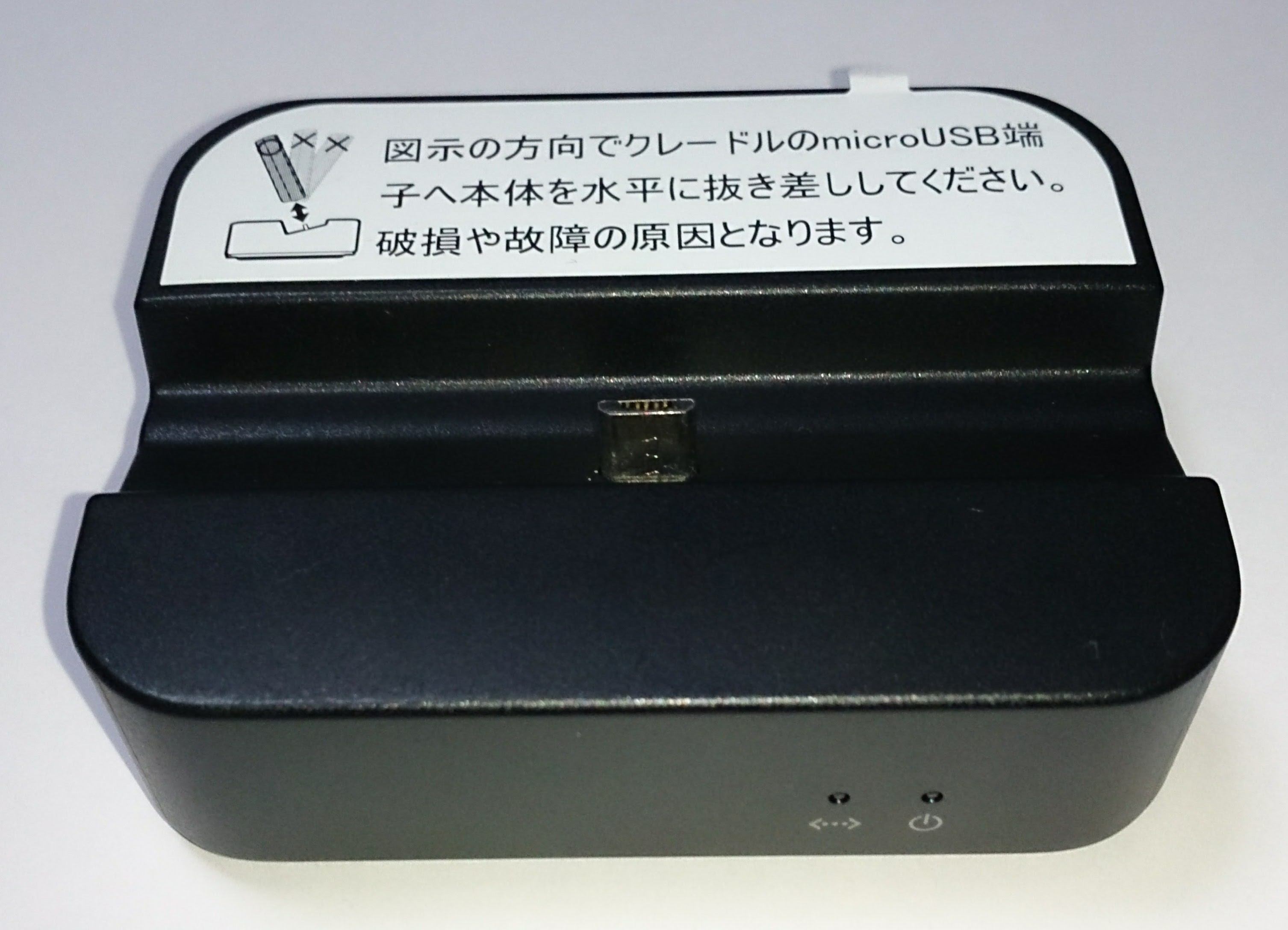 HWD15・クレードル・前面